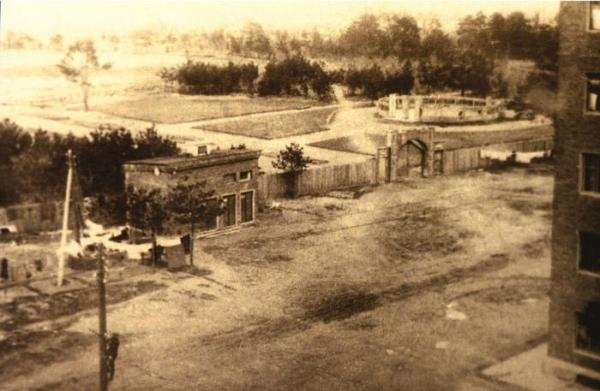 Стадион "Салют" в Тушино Stadium "Salut" in Tushino